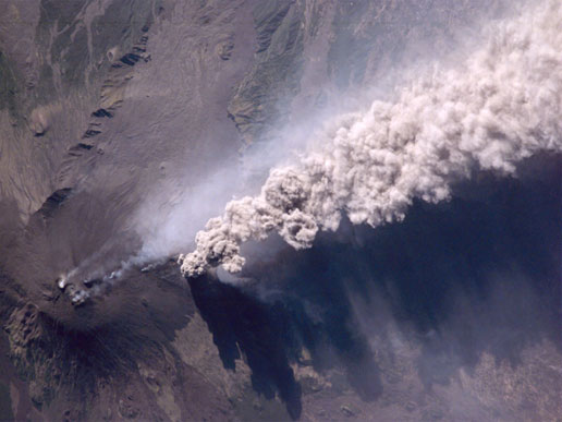 Eruption du Mt Etna, photo prise de l'ISS, NASA